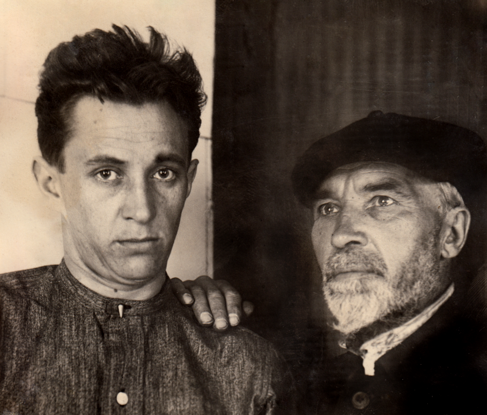 Сергей Иванович Маркин и его отец Иван Петрович Маркин